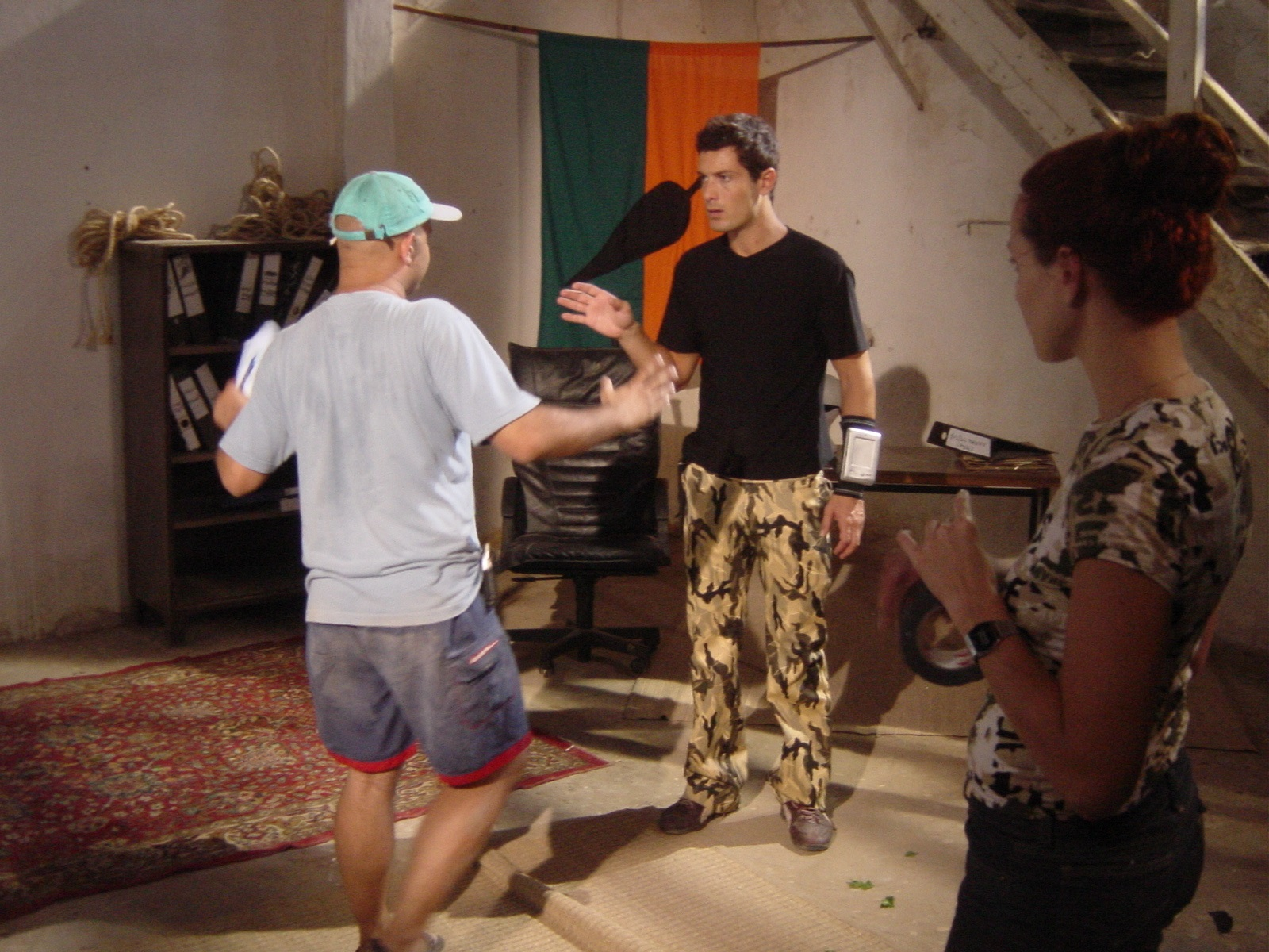 המוסד הסגור - רון שחר